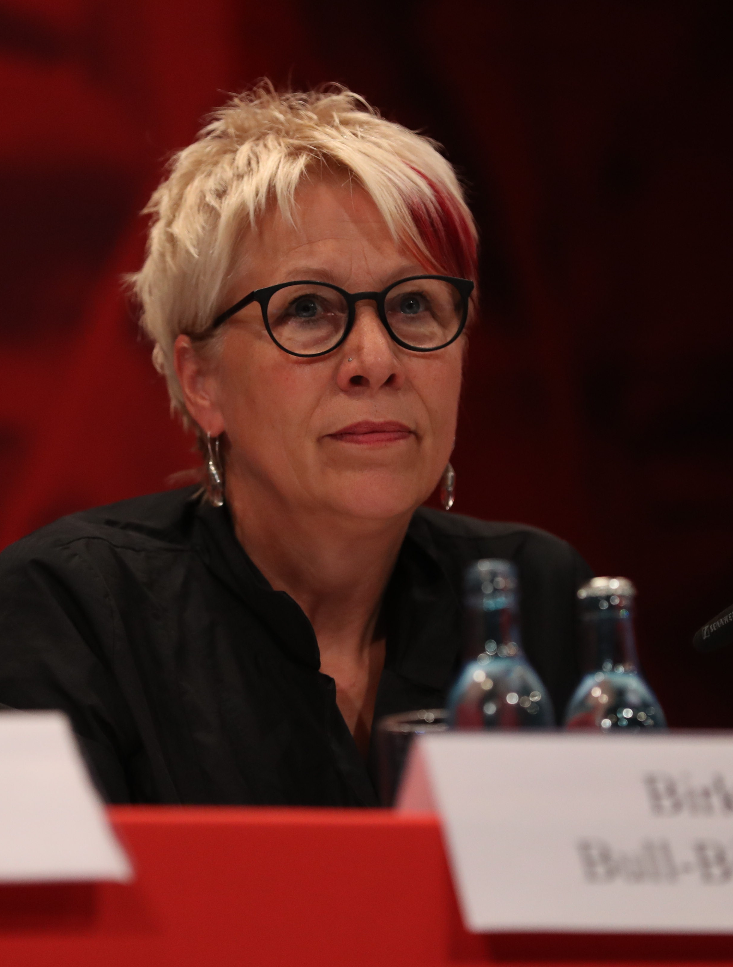 Bundesparteitag Die Linke 2018 in Leipzig